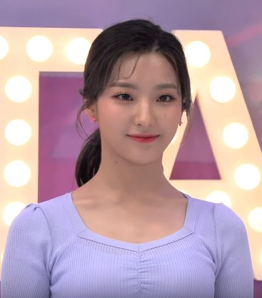 11일 오전 서울 상암동 tbs 오픈스튜디오에서 공개녹화로 ‘tbs 팩트인스타 - ‘프로미스나인’편이 진행됐다.